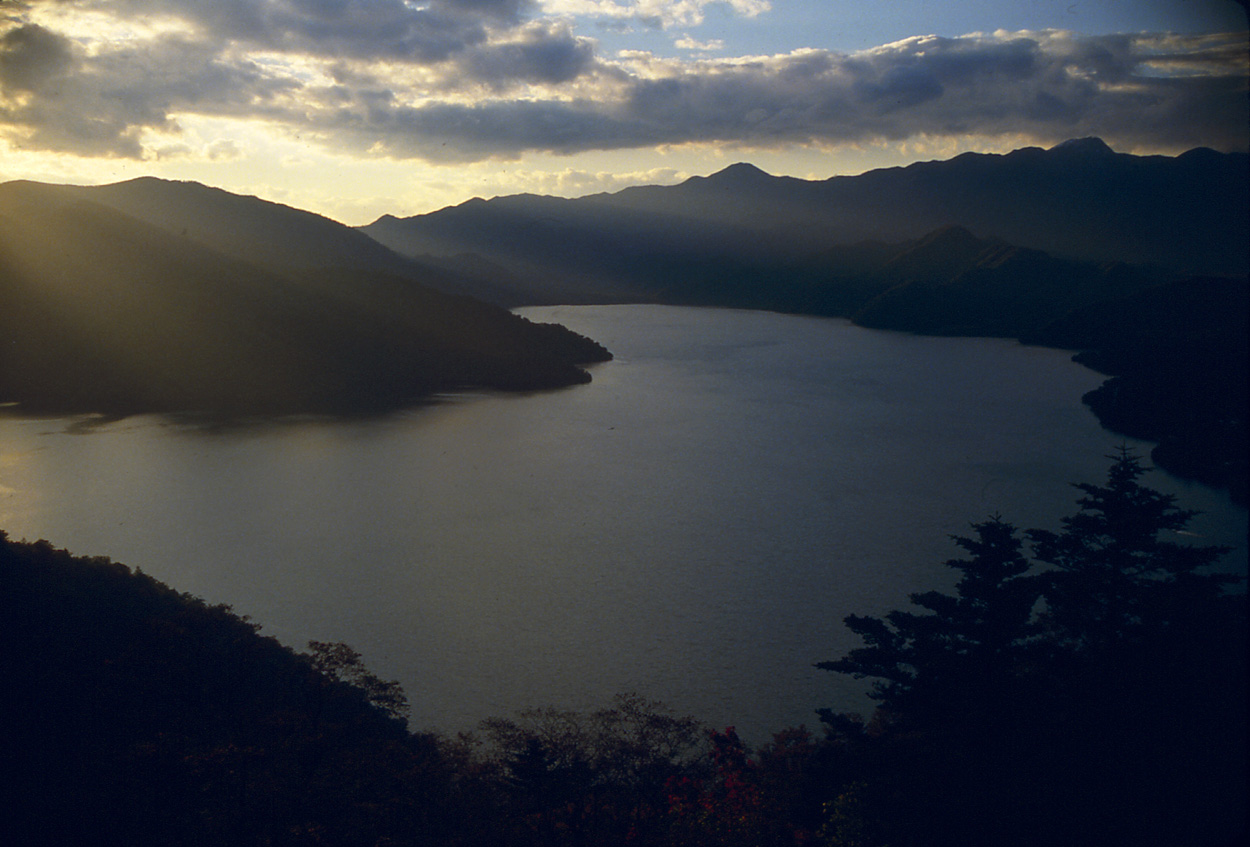 Lake in Japan. Lake Chūzenji (Chūzenjiko) in Nikko, Tochigi Prefecture. I took this photo.